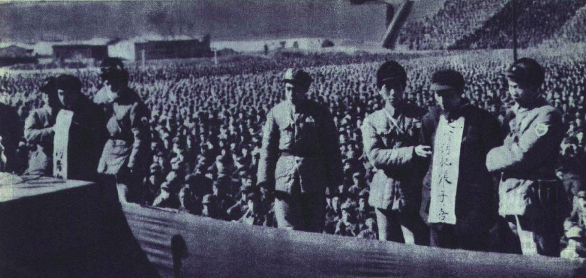 1952年2月10日刘青山张子善在保定人民体育场公审